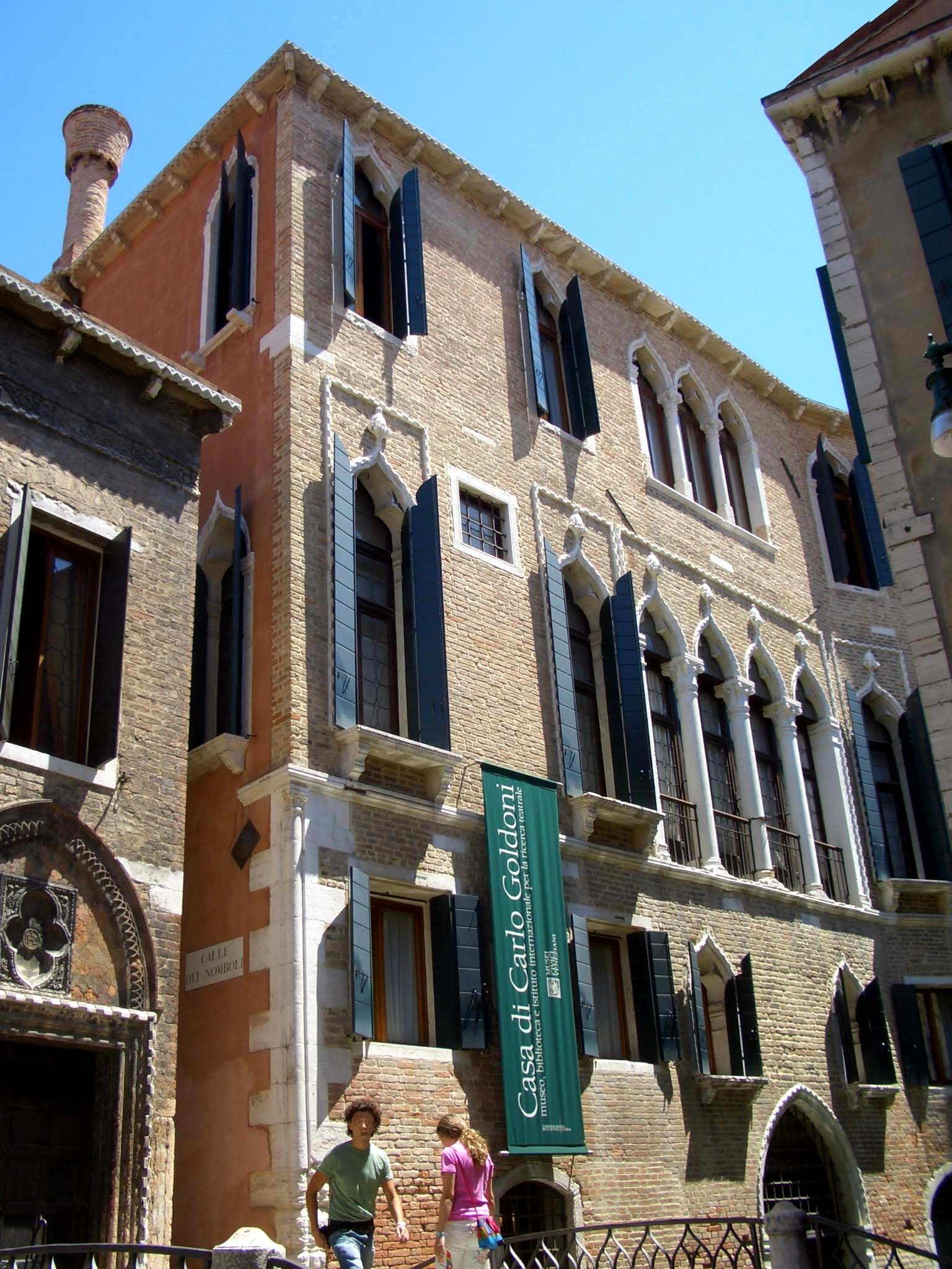 Casa di Carlo Goldoni - Venzia